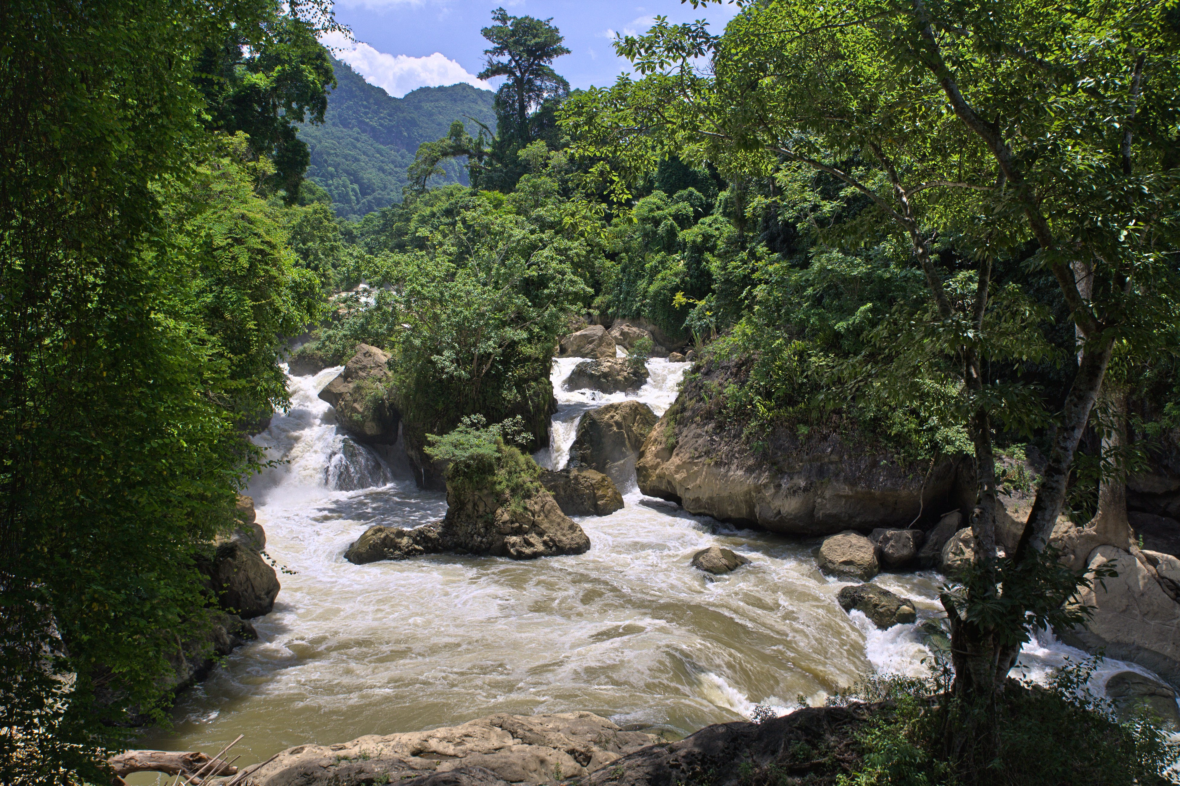 Dau Dang Waterfall (Thác Đầu Đẳng) in Ba Be National Park, Vietnam